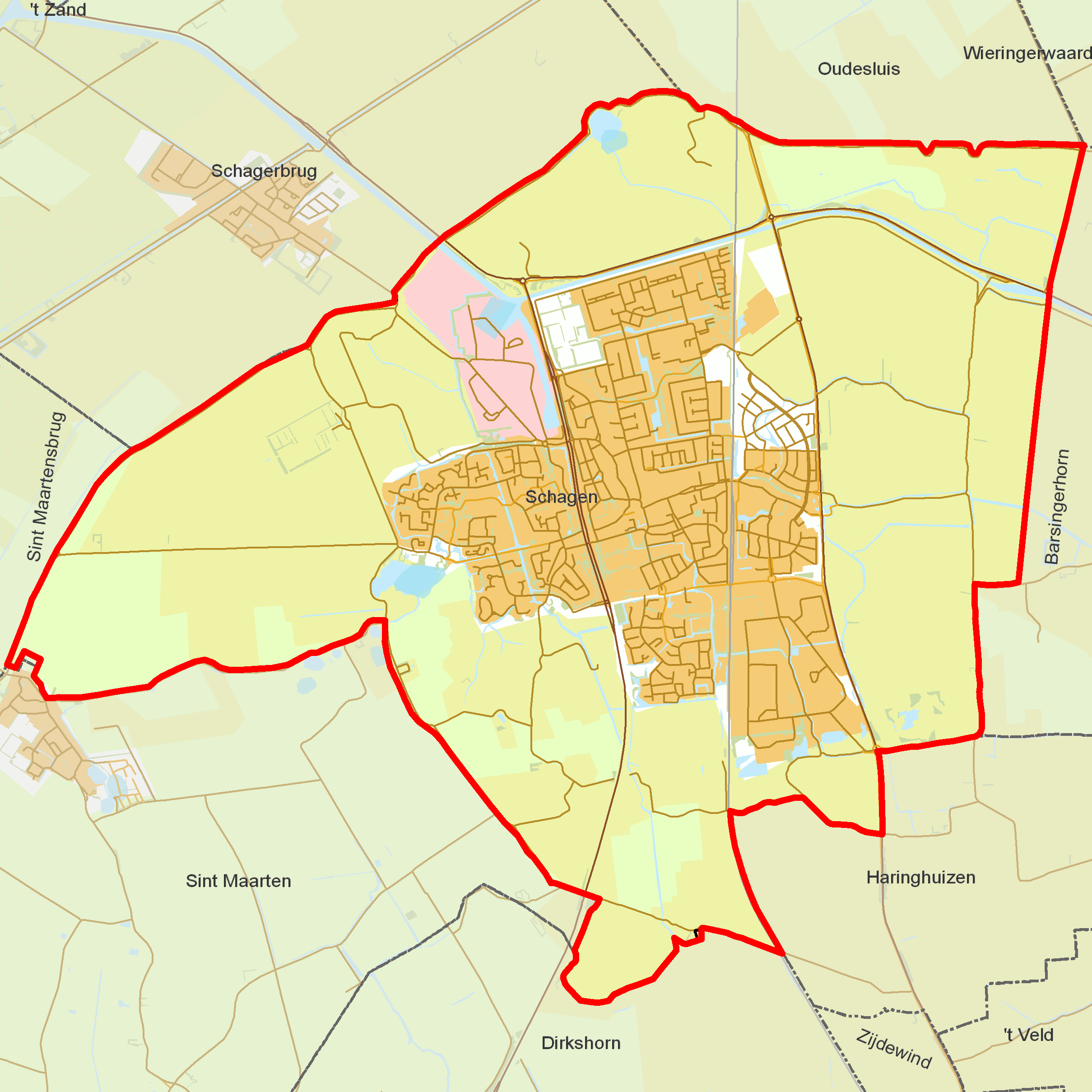 BAG woonplaatsen - Gemeente Schagen.png